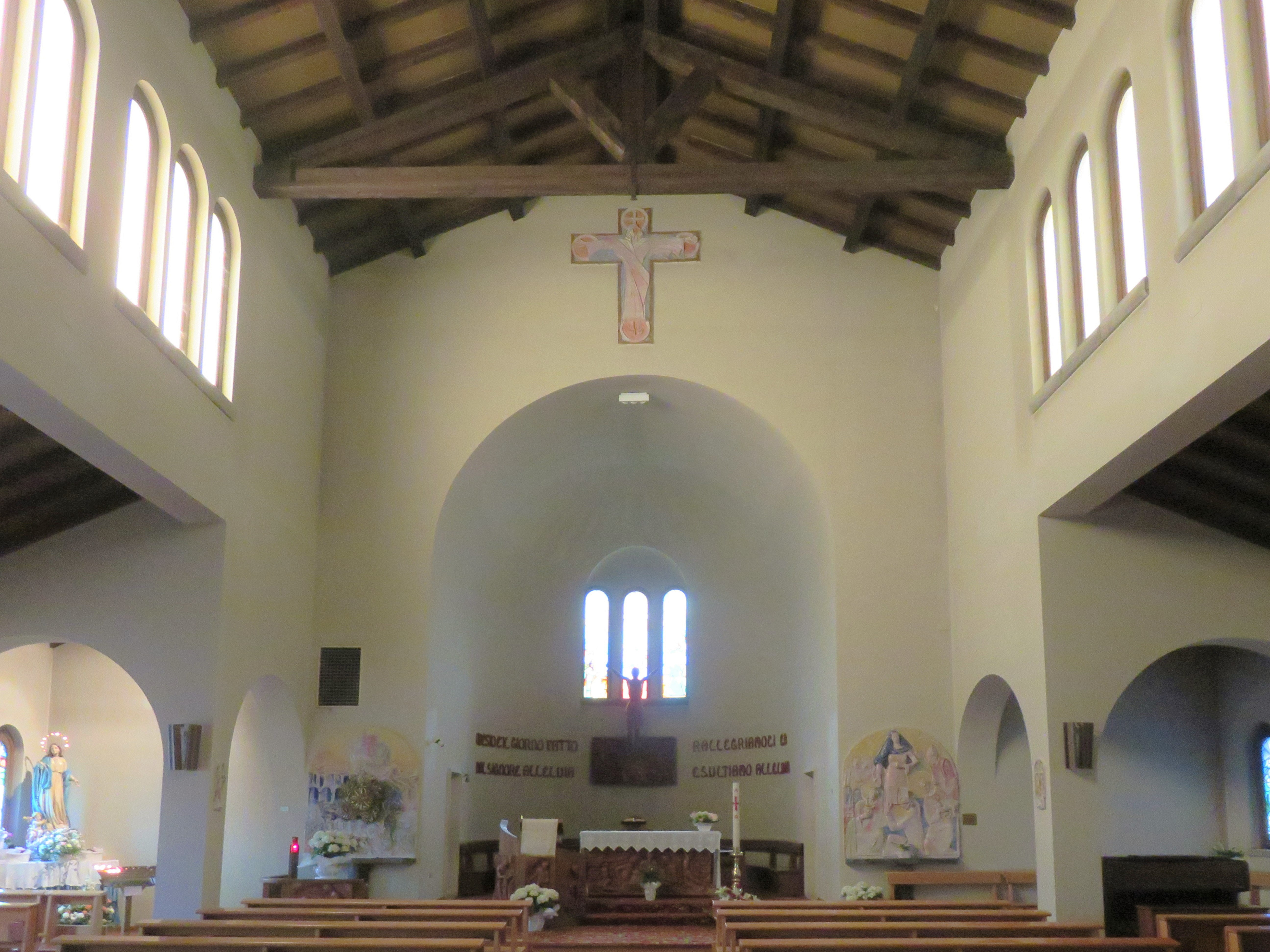 Chiesa di Santa Croce, interni